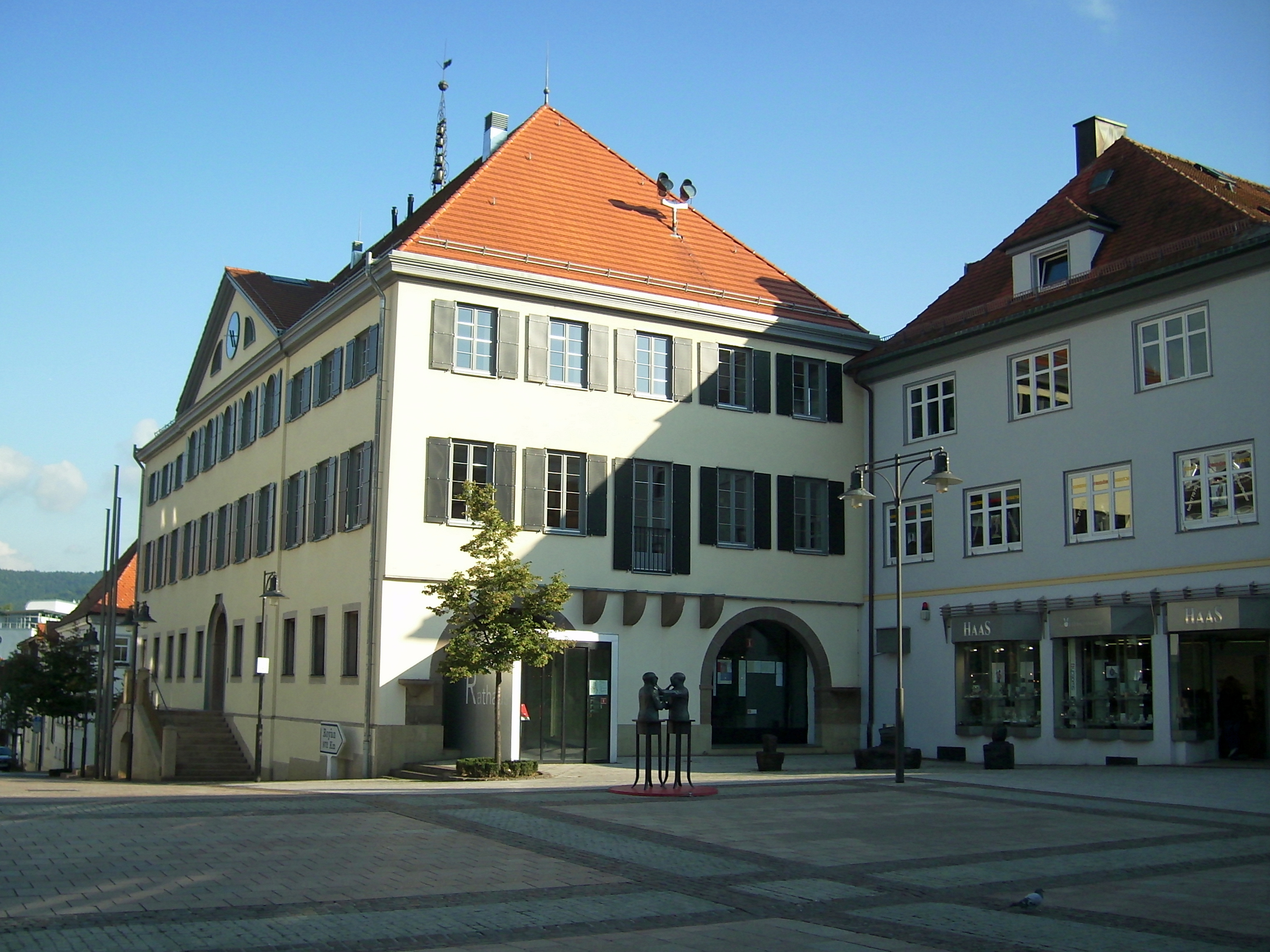 Balingen Rathaus Balingen und Marktplatz